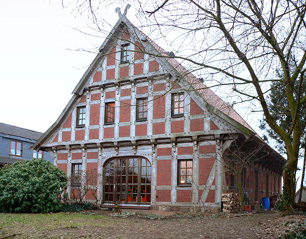 Neues Wohnhaus im Stil des Niederdeutschen Hallenhauses